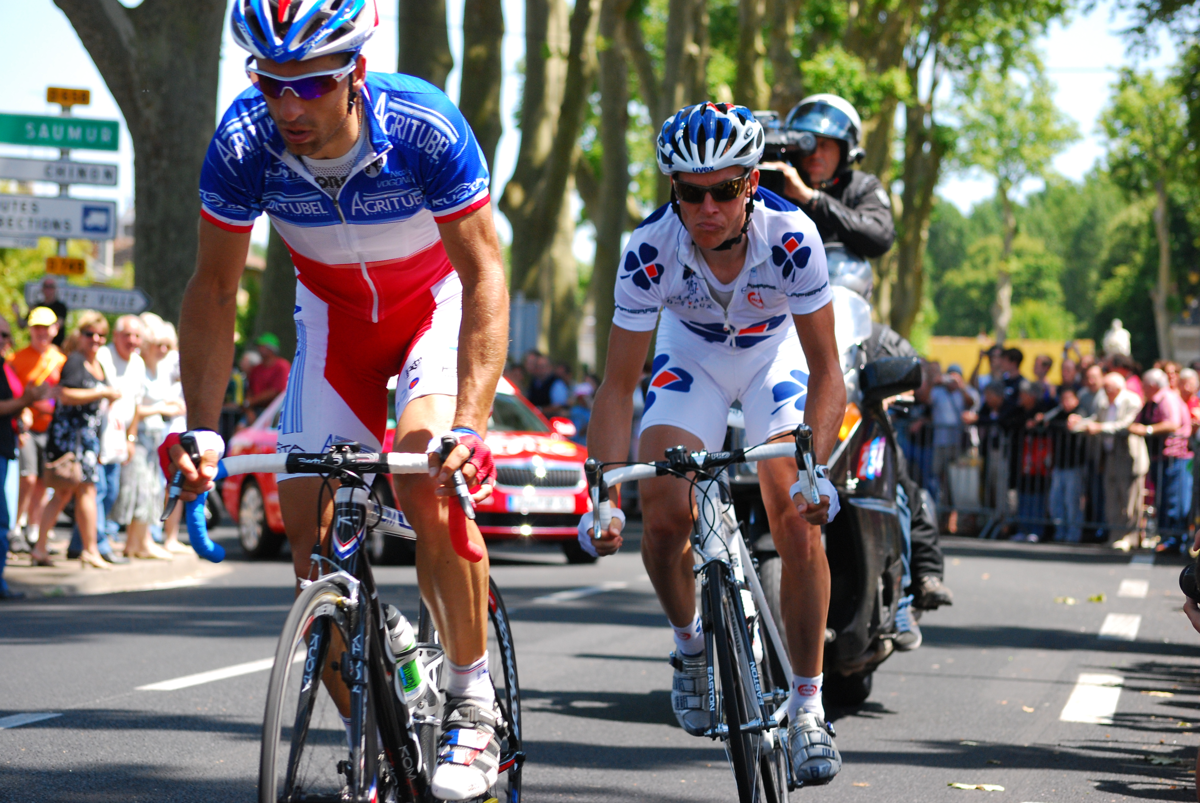 Tour de France 2008 - Etape Cholet Châteauroux Deux des échappés du jour - Nicolas Vogondy